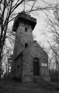 Weiglwarte - Aussichtsturm auf dem Sandl in der Wachau (Niederösterreich)